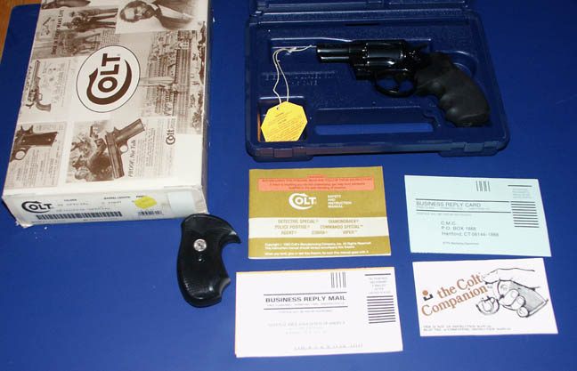 DS ALL